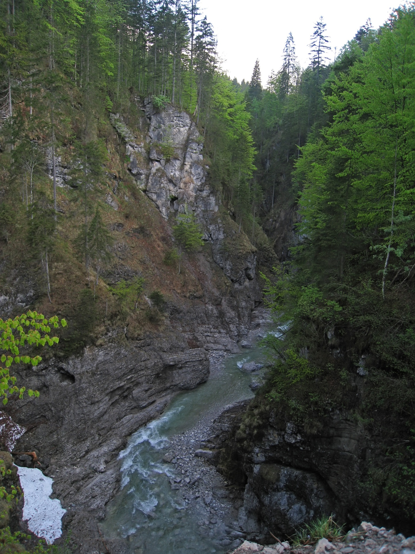 Dürrachklamm